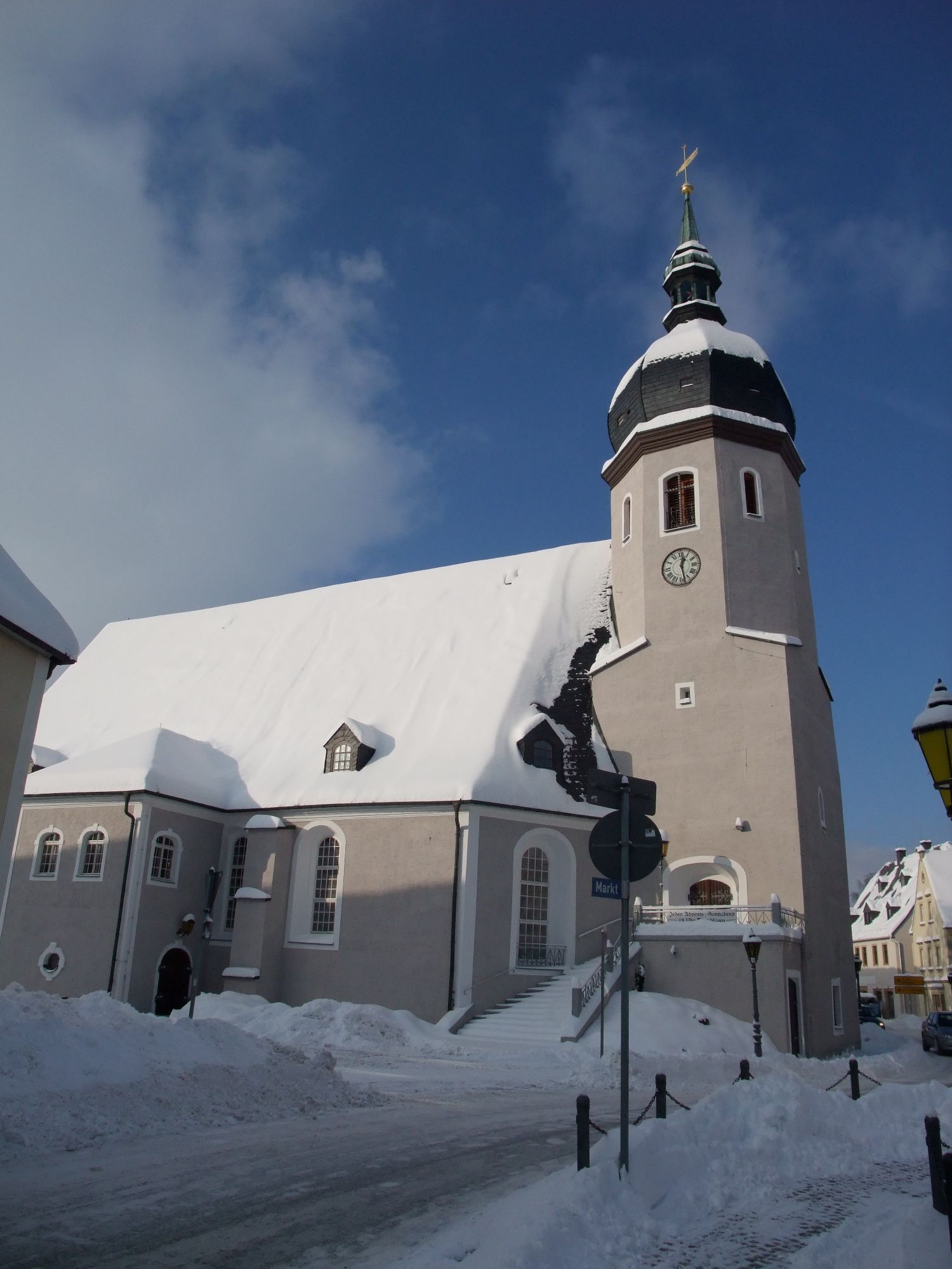 Die Stadtkirche in Olbernhau von Südwesten gesehen.